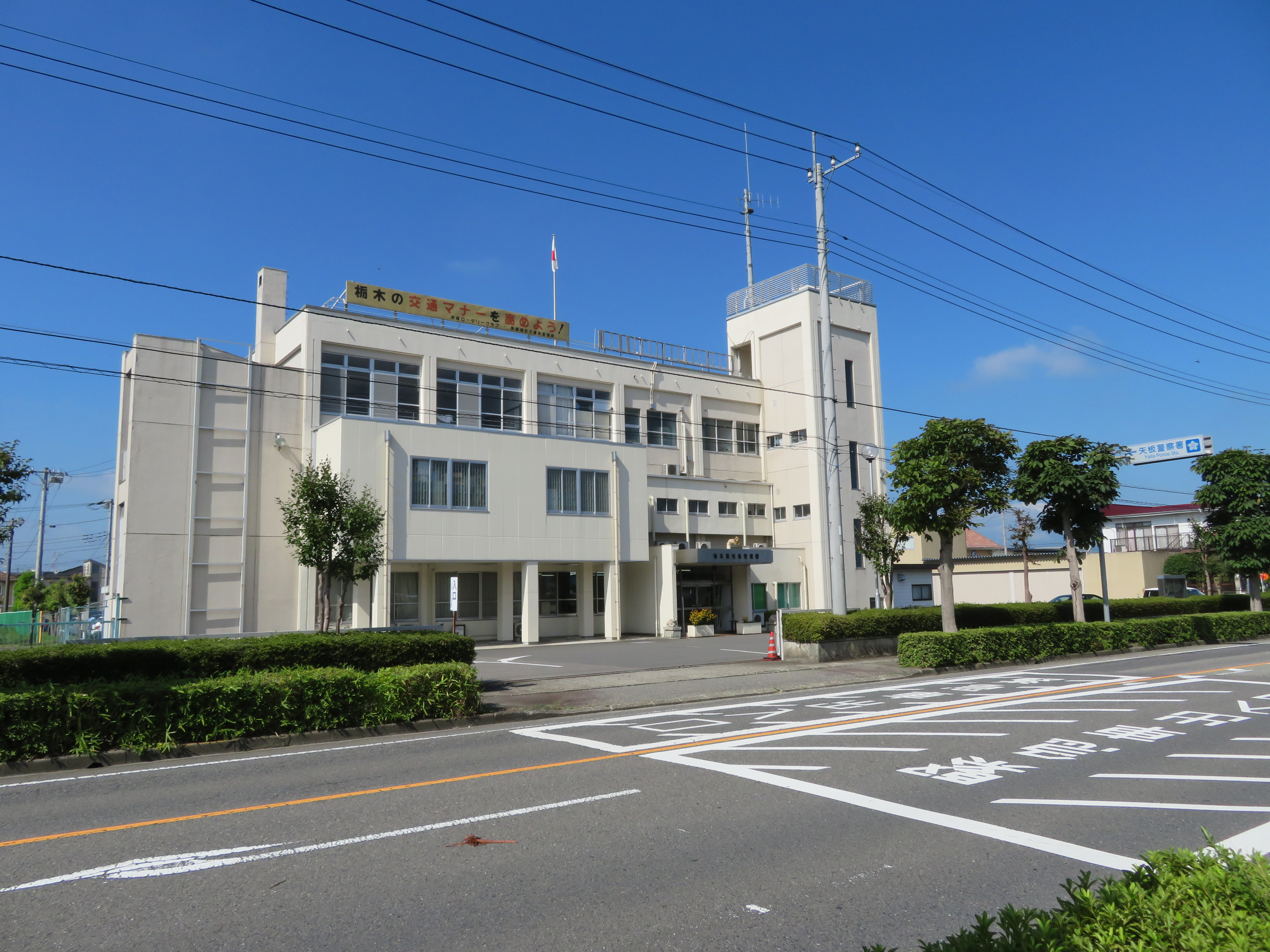 栃木県矢板警察署庁舎 Canon PowerShot SX720 HS